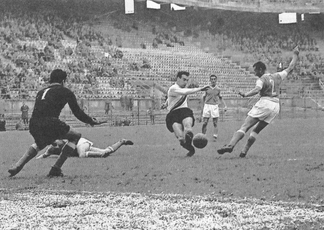 Milano (Italia), stadio San Siro. Il calciatore italo-argentino Antonio Valentín Angelillo (al centro) in azione all'Inter tra gli anni 50 e 60 del XX secolo.